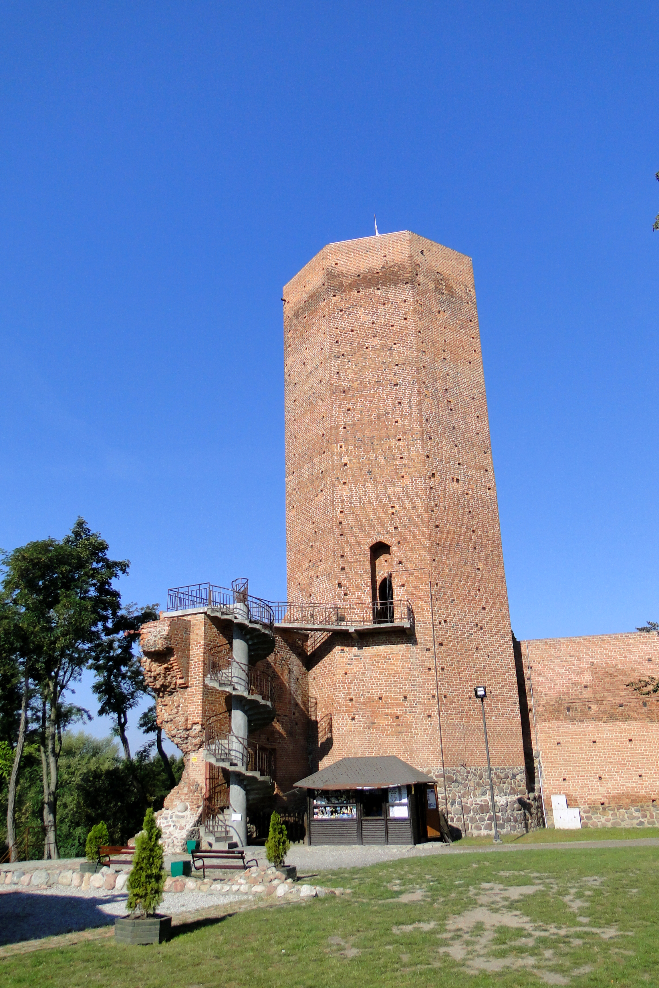 Kruszwica, Ruiny zamku, tzw. Mysia Wieża, poł. XIV w.